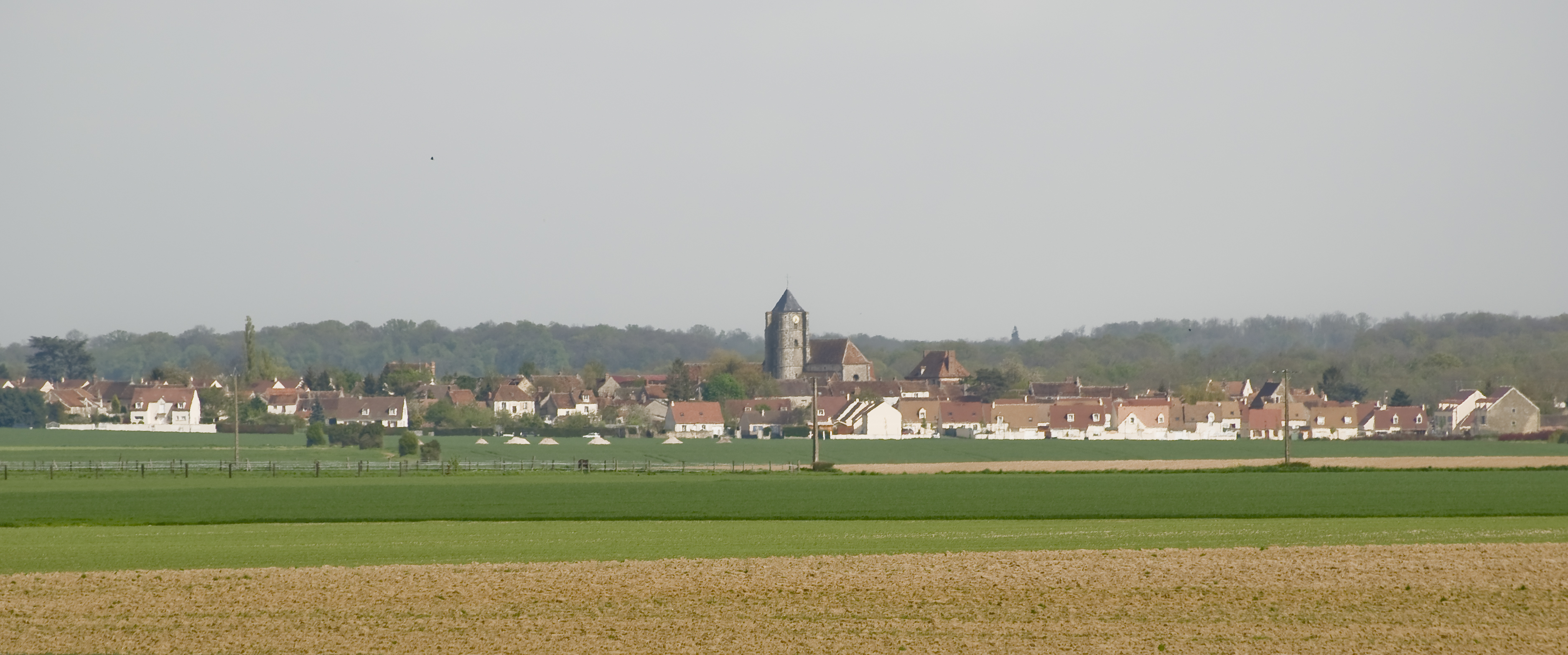 La commune française d'Ozouer-le-Voulgis photographiée depuis le pont de TGV